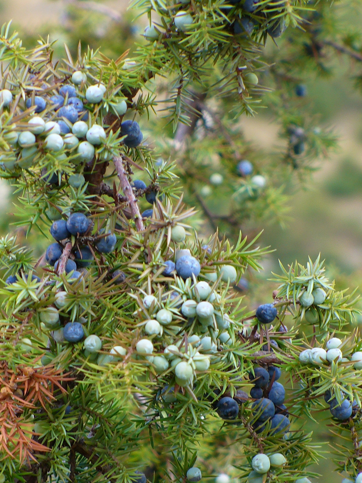 Juniperus communis, Parco nazionale del Gran Sasso e Monti della Laga, Teramo, Abruzzi, Italy